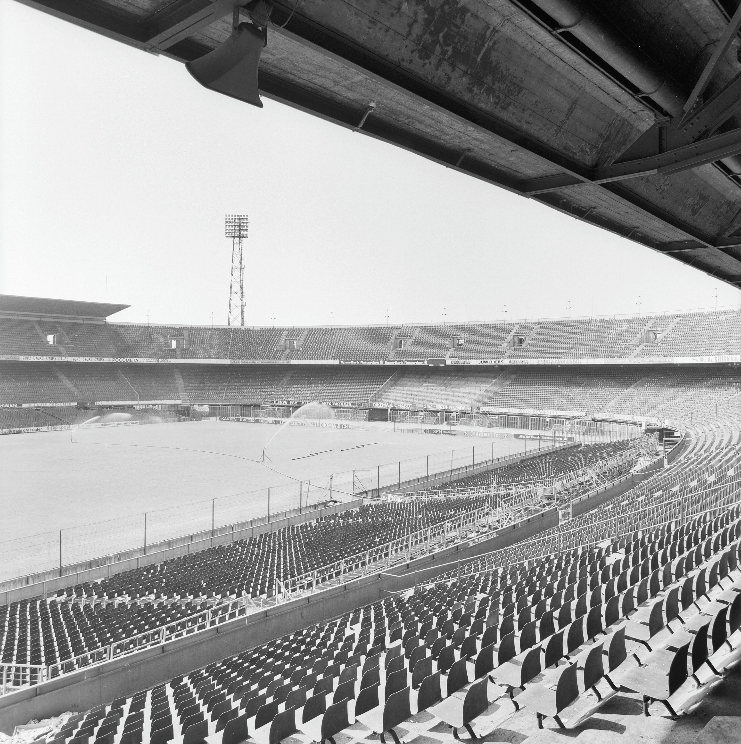 Feyenoord Stadion - voetbalstadion - De Kuip: Overzicht tribune en veld